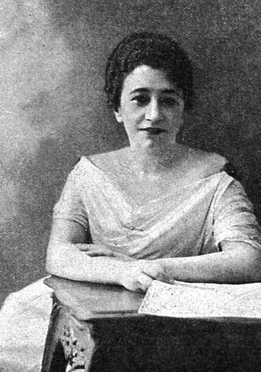 Elvira Santa Cruz y Ossa —más conocida como Roxane— (Valparaíso, 21 de marzo de 1886 - 7 de noviembre de 1960) fue una periodista, escritora, poetisa y editora chilena2​ adscrita al género de la literatura infantil y juvenil, escribiendo y recopilando cuentos y novelas